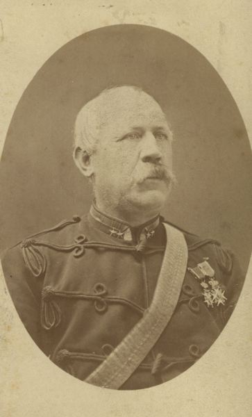 Överste Hans Aron Siöcrona (1825-1898).